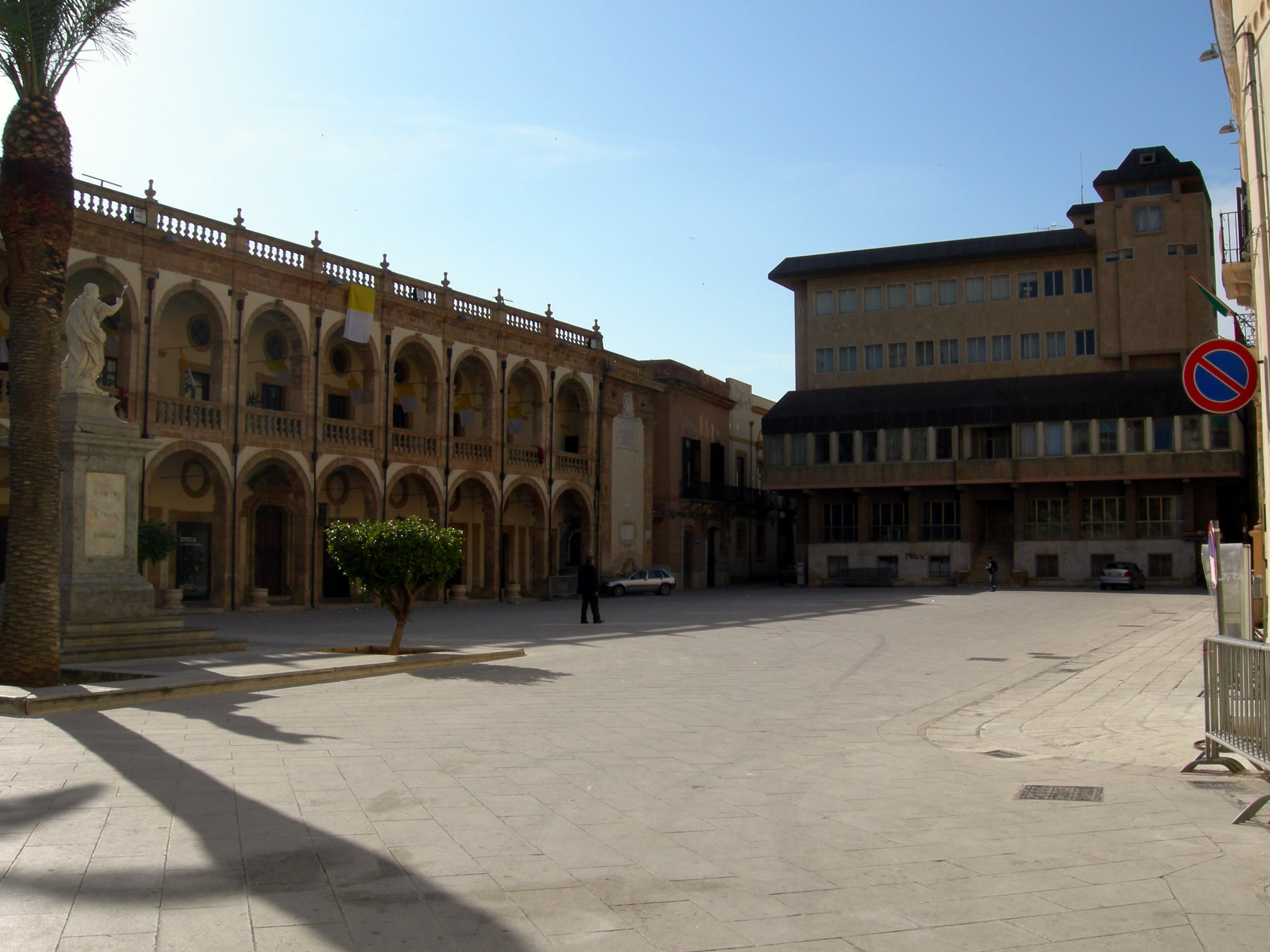 Piazza della Repubblica a Mazara del Vallo, Sicily, Italy. Vi sorge il monumento a san Vito, opera di Ignazio Marabitti.